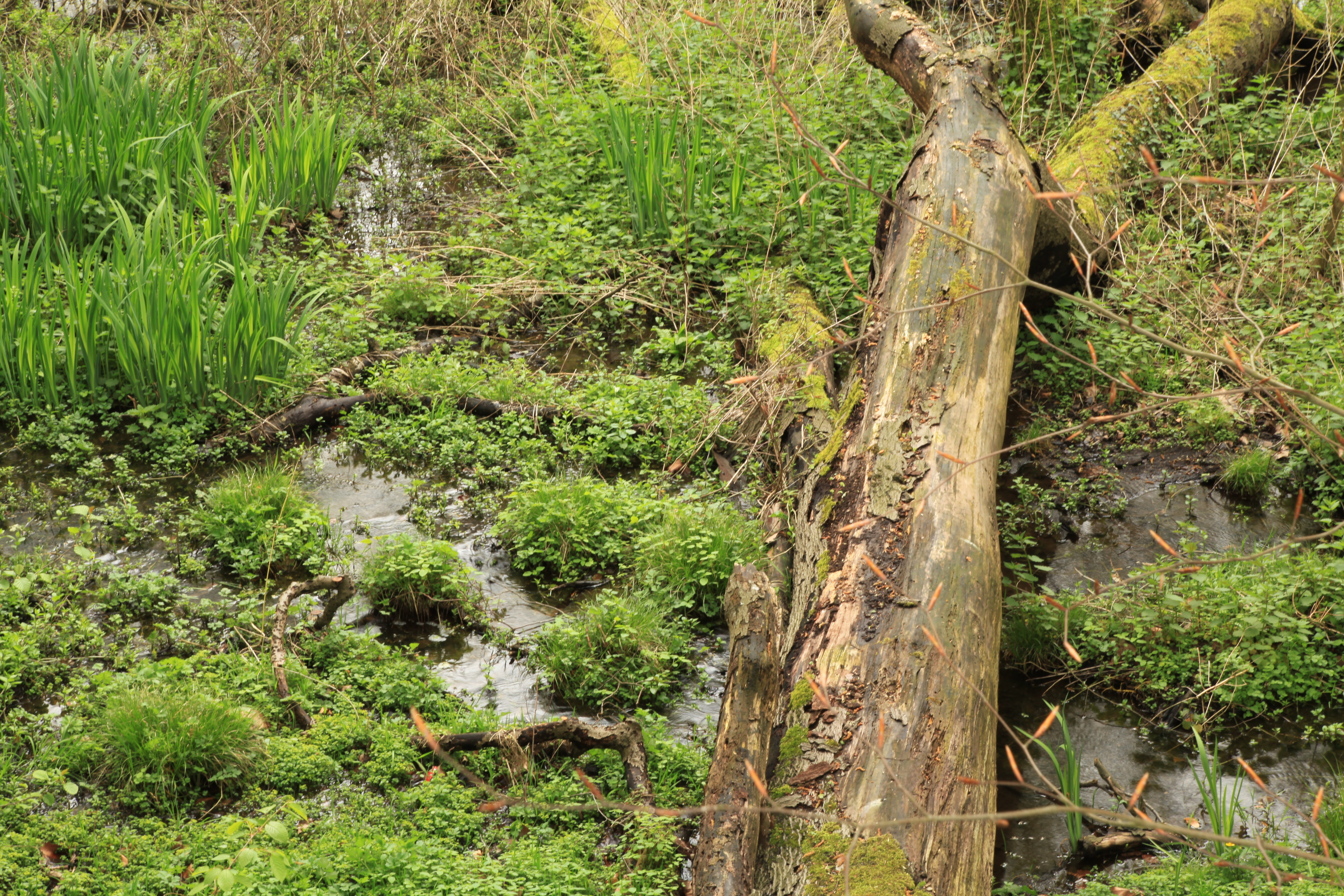 Hummelsbach am Linneper Weg in Ratingen-Breitscheid